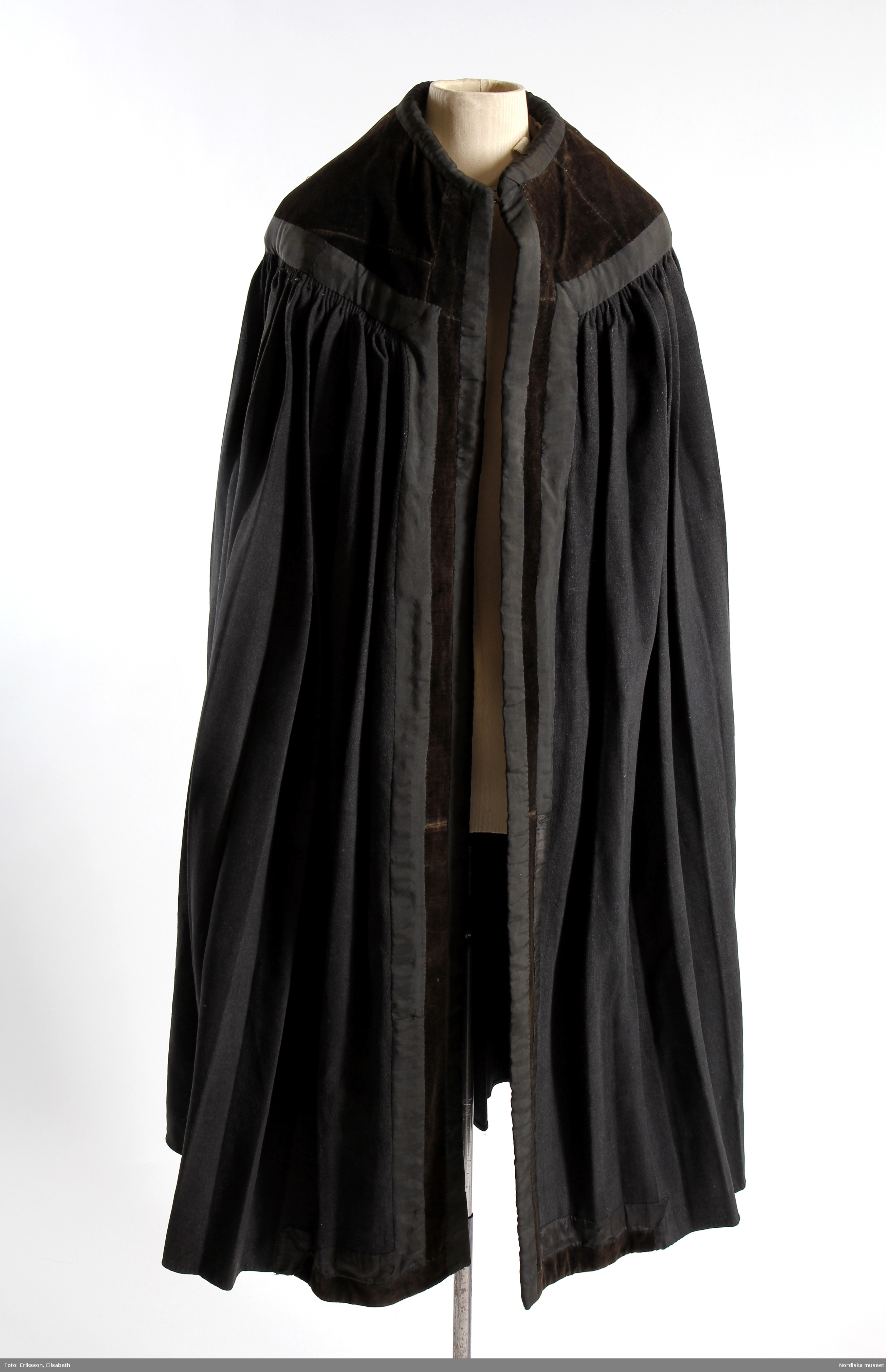 Kåpa